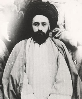 Mirza Abutaleb Zanjani, c. 1880